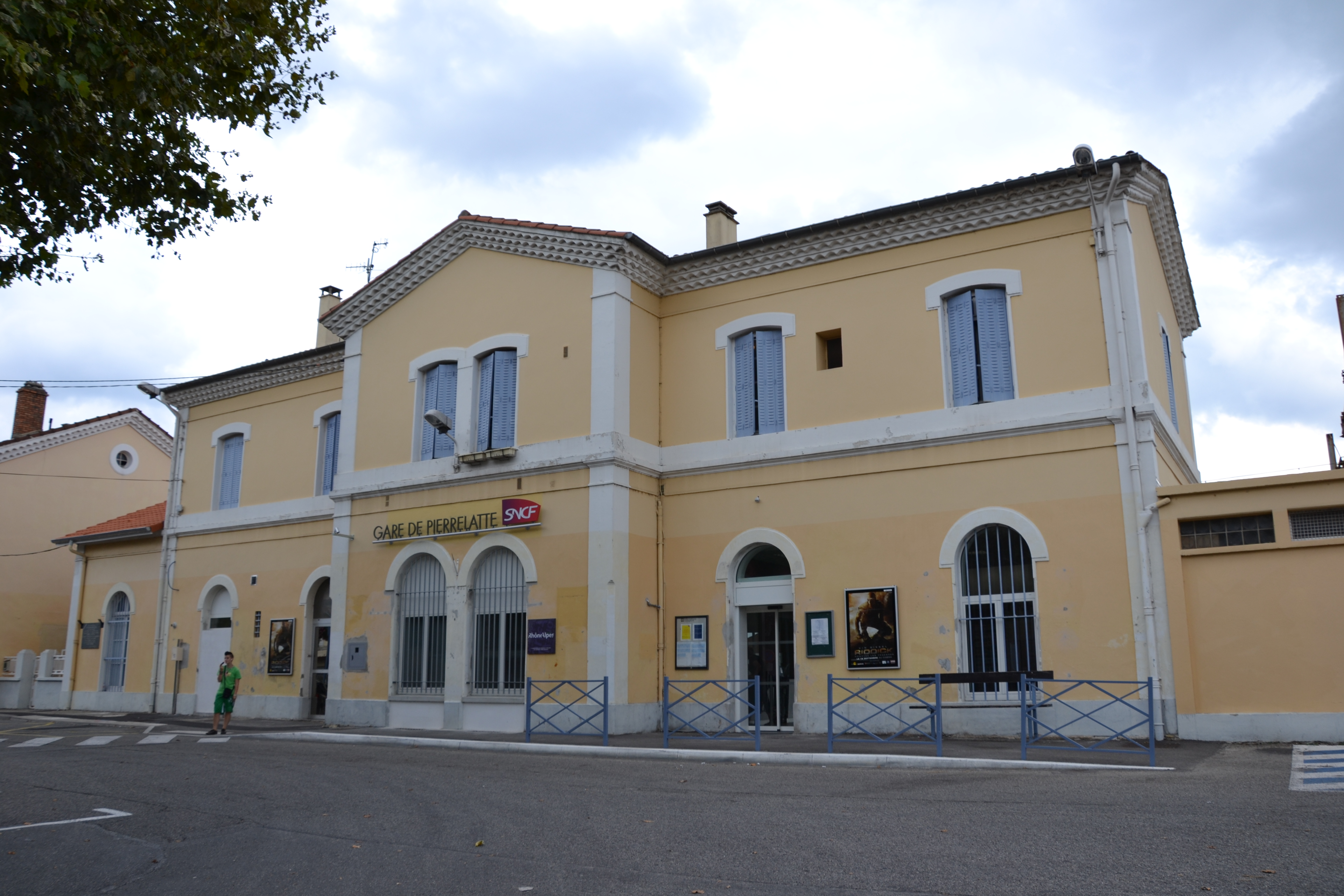 Gare de Pierrelatte : facade